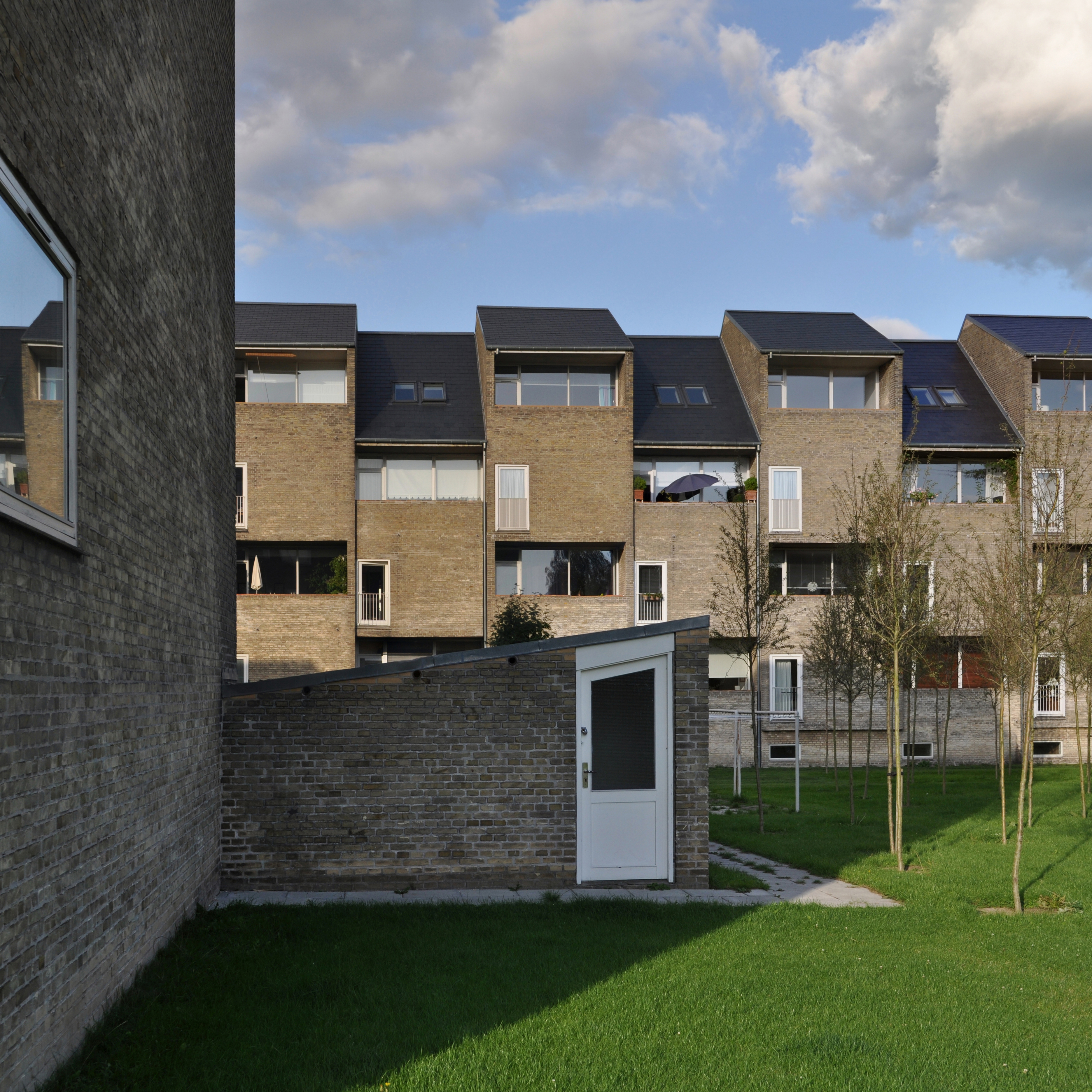 arne jacobsen, alléhusene housing, gentofte 1949-1953